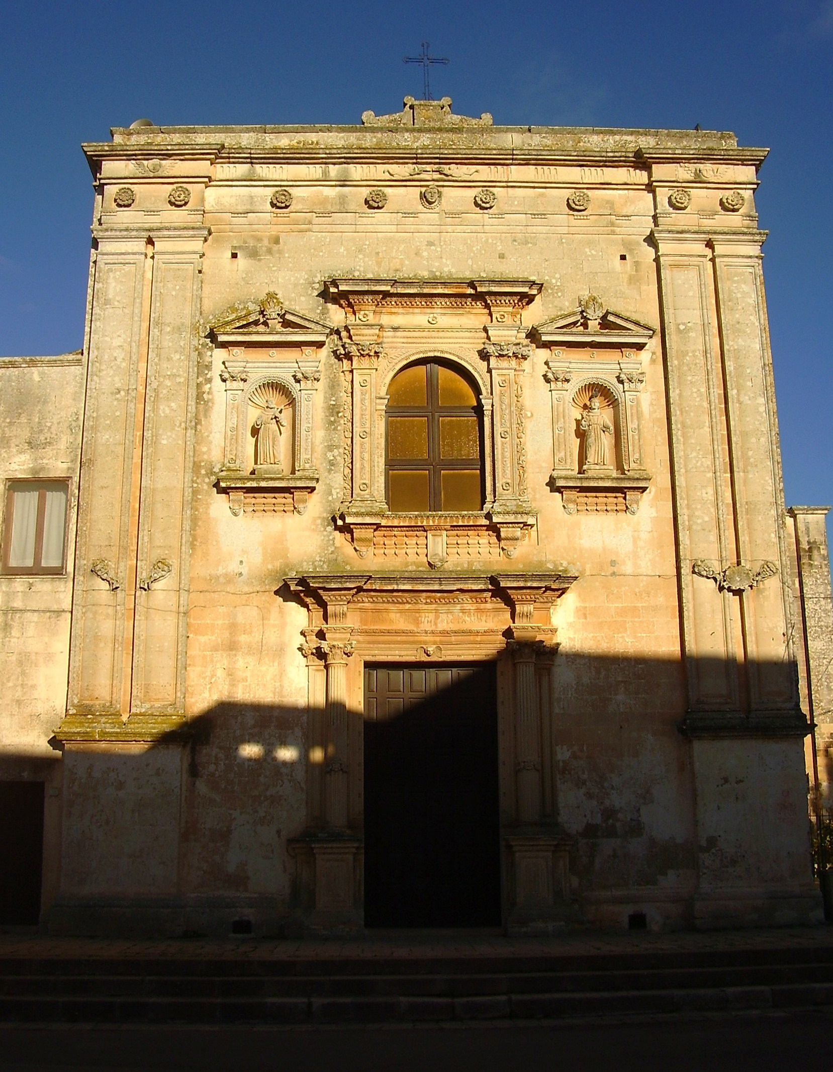 Chiesa Madonna delle Grazie Soleto, Lecce